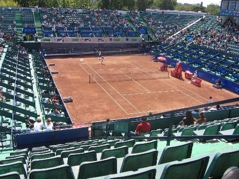 Arena principala BNR, una dintre arenele pe care se joacă BCR Open România